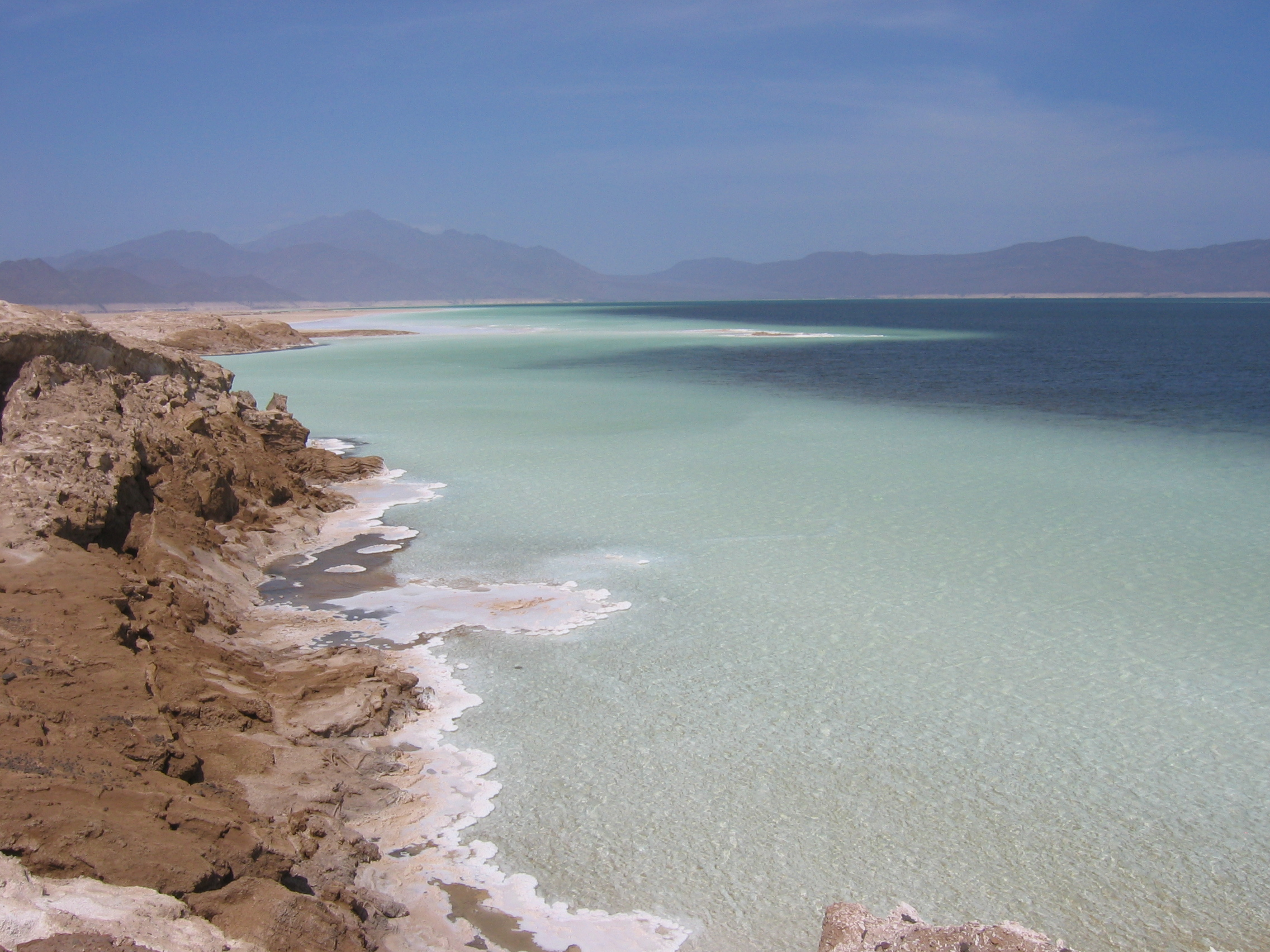 Lake Assal Djibouti